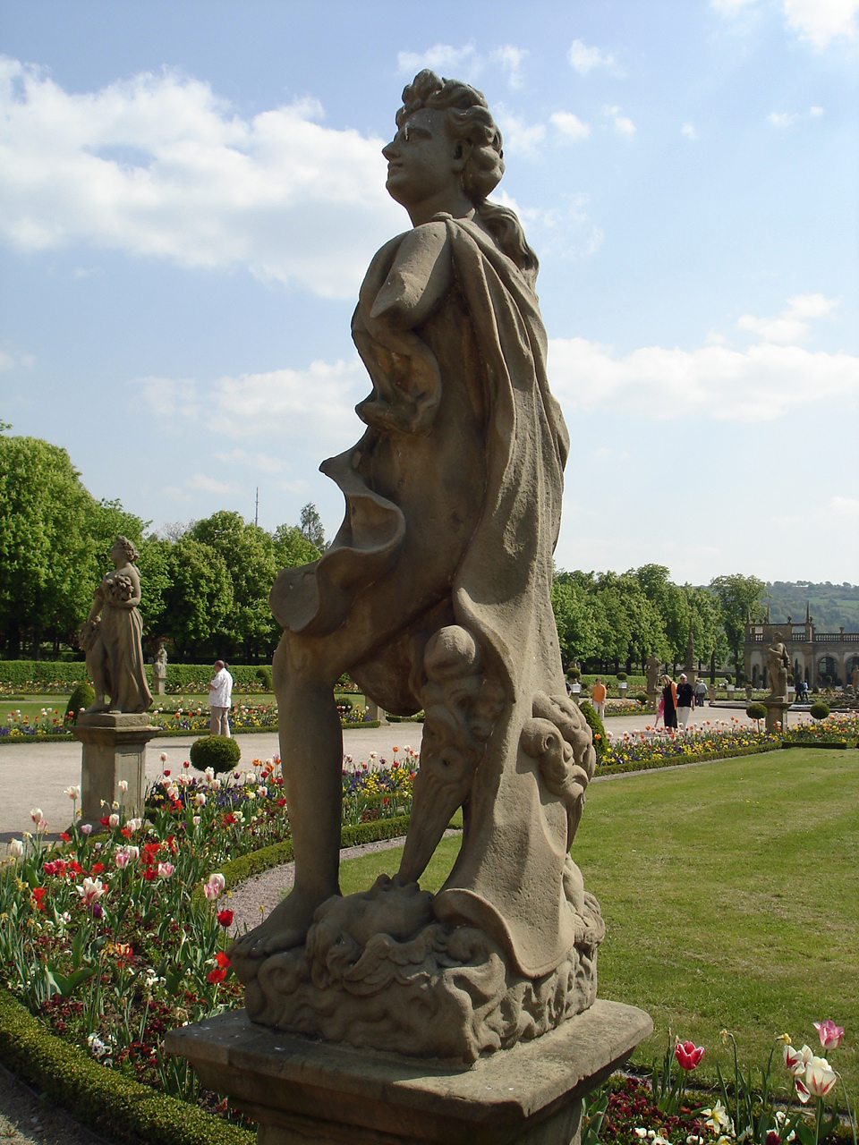 Statue im Schlosspark Weikersheim